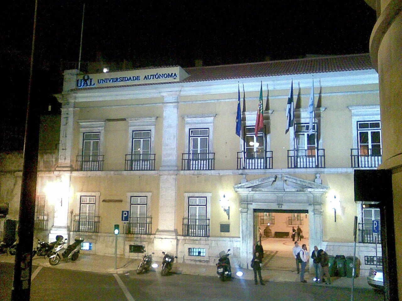 Universidade Autónoma Lissabon(Portugal)